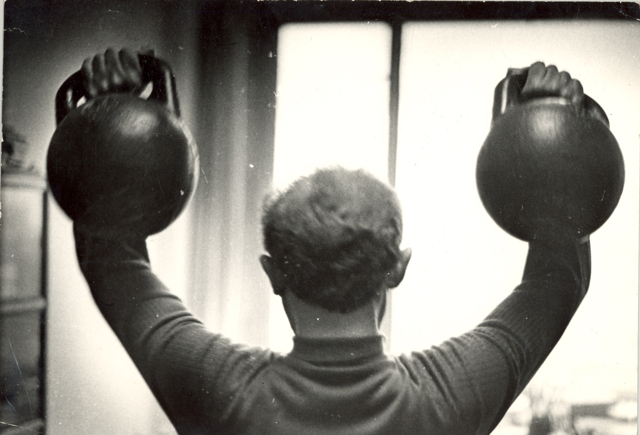 Всеволод Вильчек с гантелями в редакции.